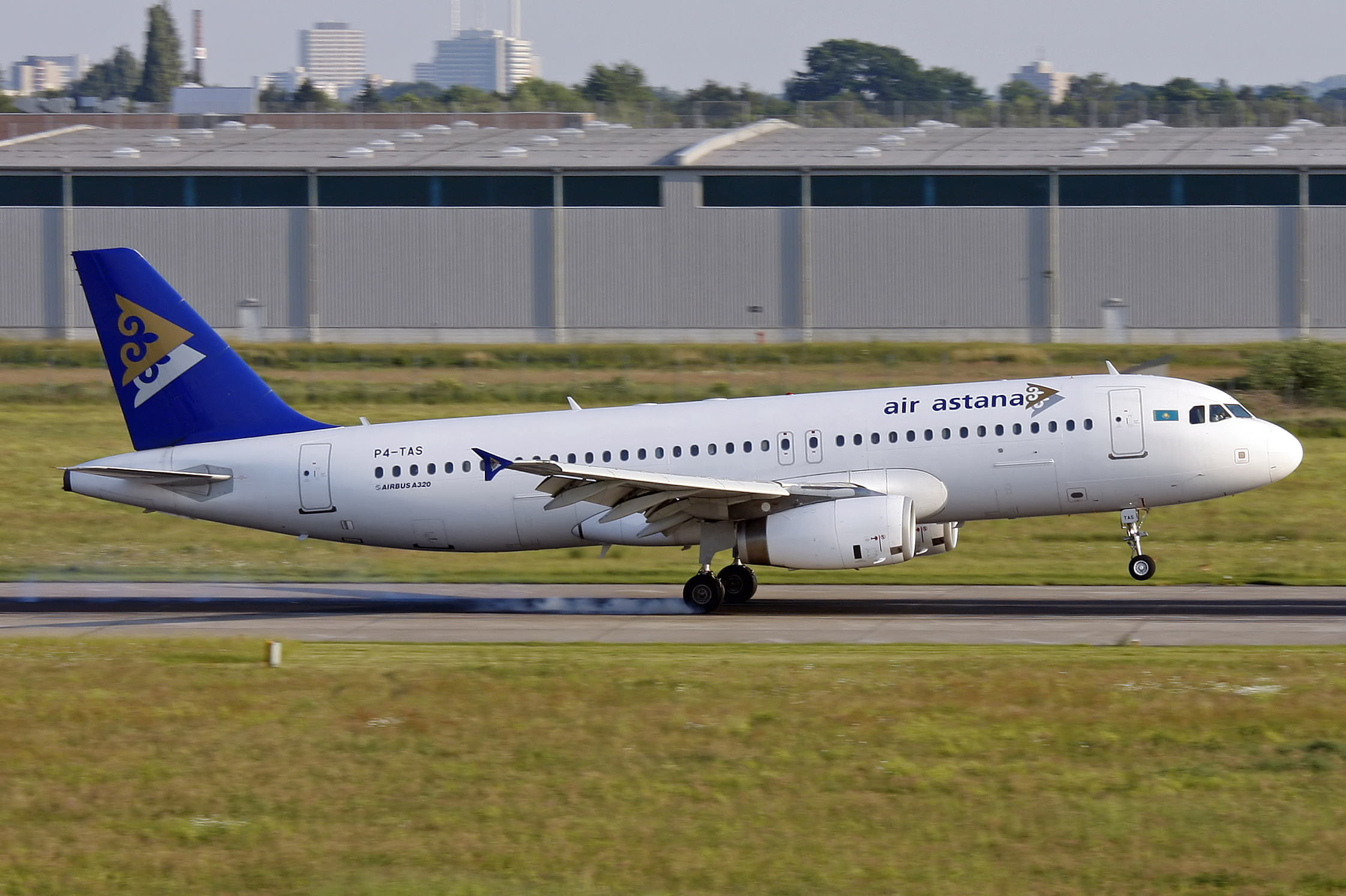 Haj / Eddv 24-05-09